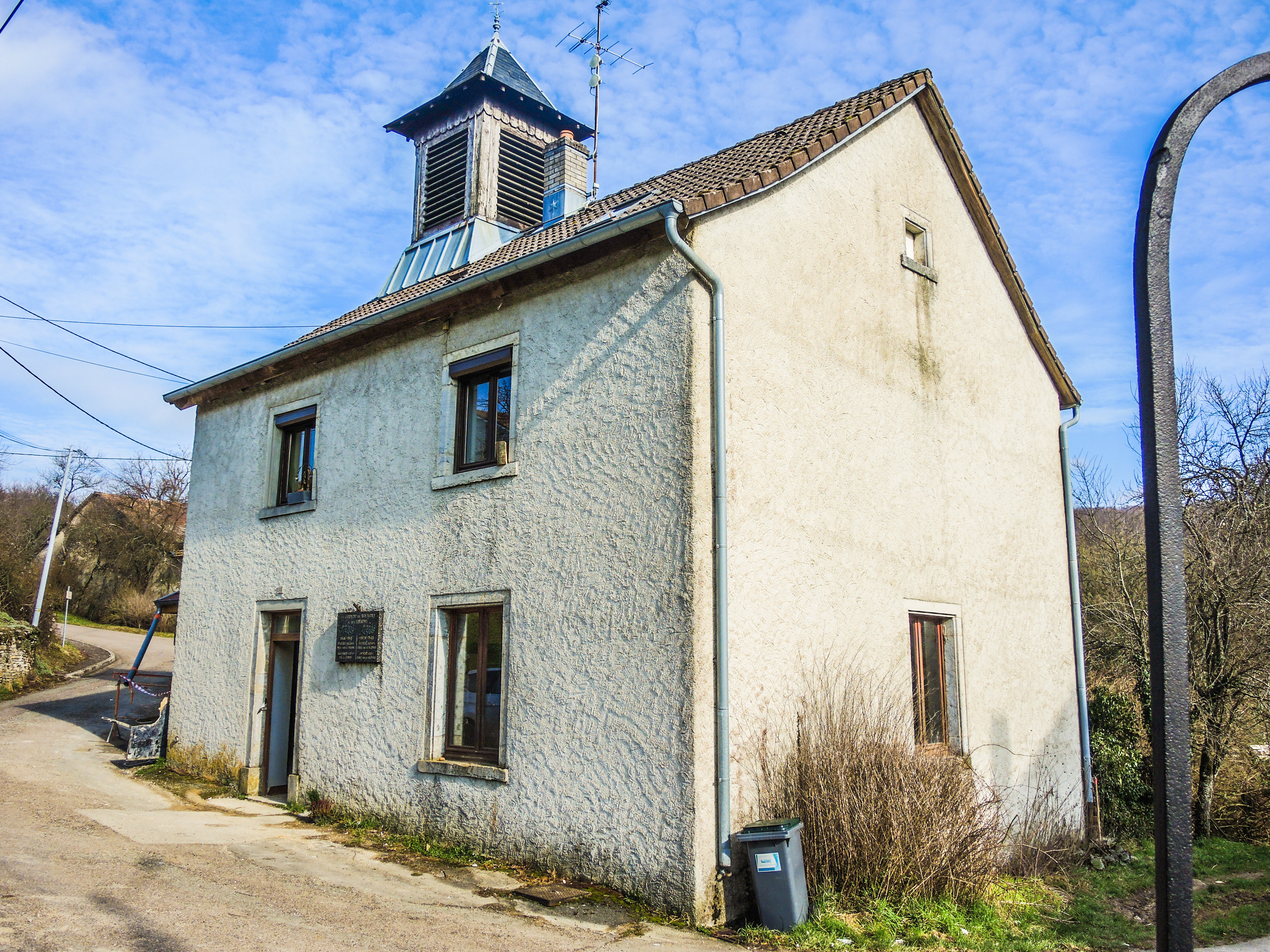 Mairie et ancienne école de Brétigney. Doubs.